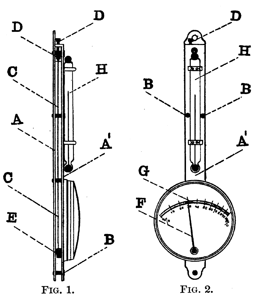 Igrometro di Saussure A, A' - supporti di ottone (23,7 e 22 cm x 2 cm) B - rivetti C - 6 capelli sottili (18 cm) D - vite di sospensione/taratura E - leva F - indicatore G - scala di umidità percentuale H - termometro